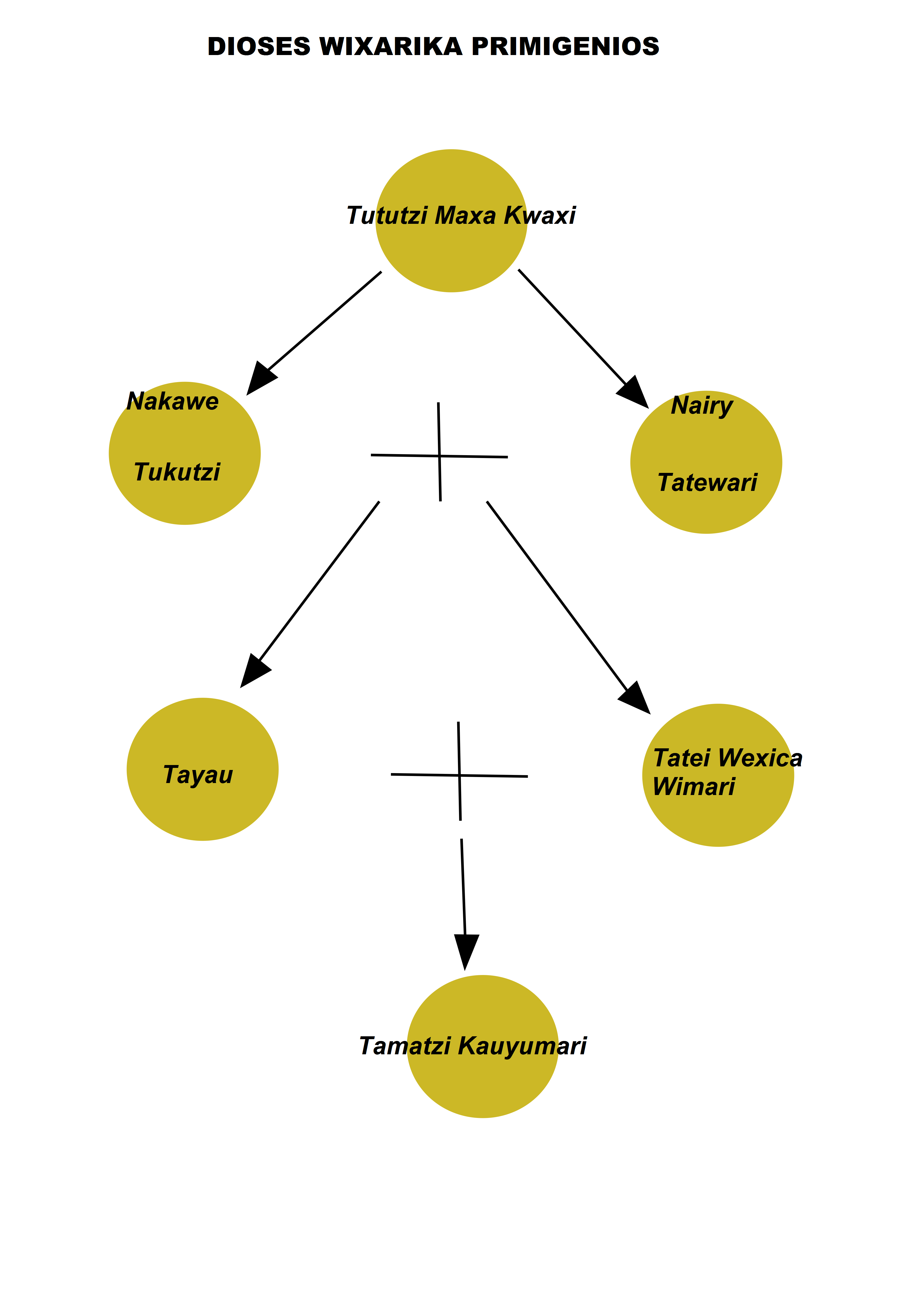 Arbol genealógico de los principales dioses huicholes.